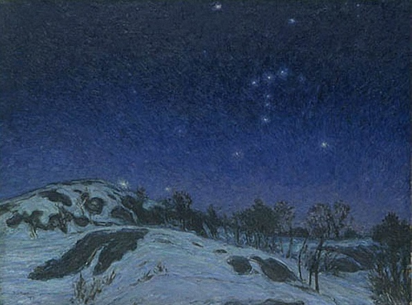 Winter Nightlabel QS:Len,"Winter Night"